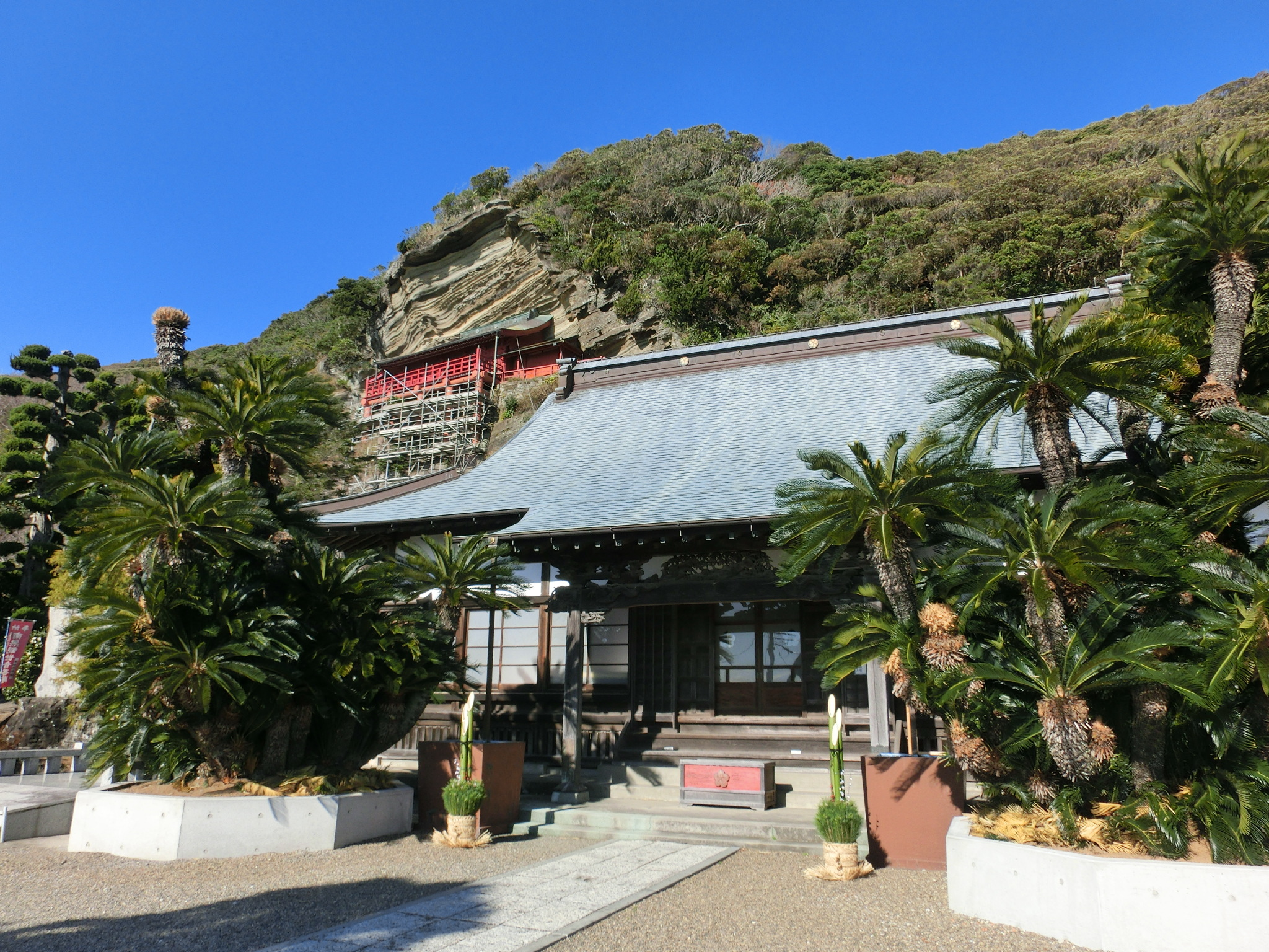 千葉県館山市の大福寺